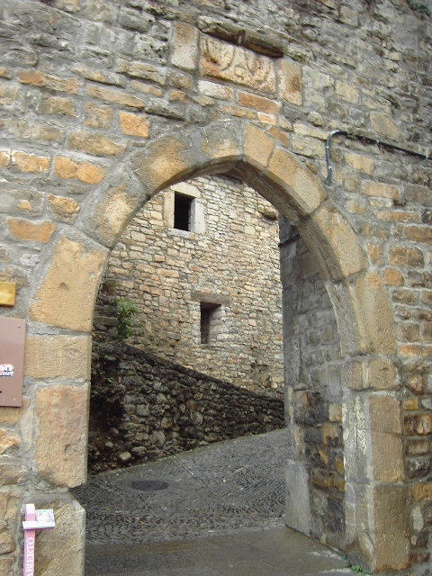 Puerta de la muralla de l'Aínsa conocida como O Portal d'Afuera.